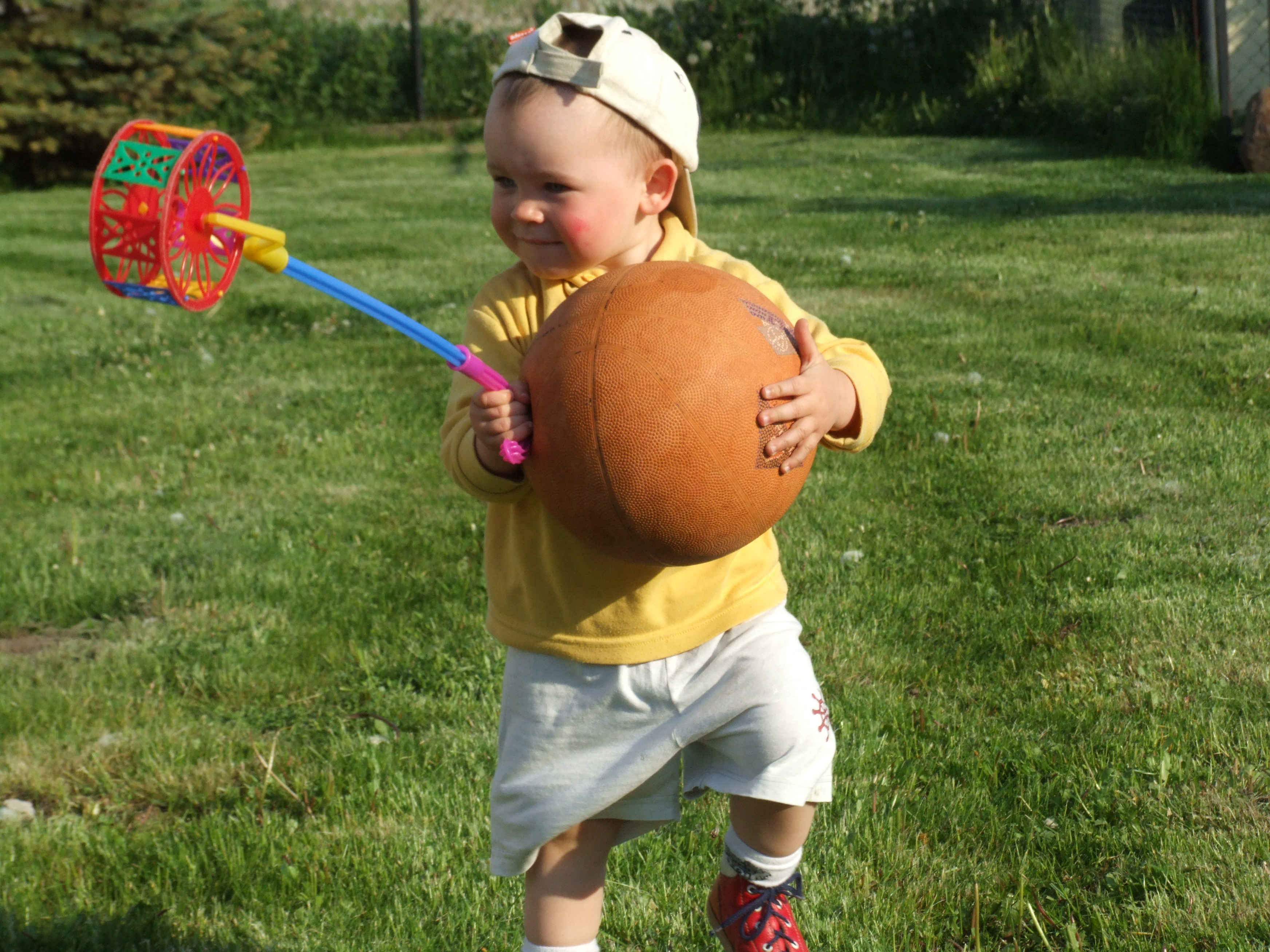 Szymon